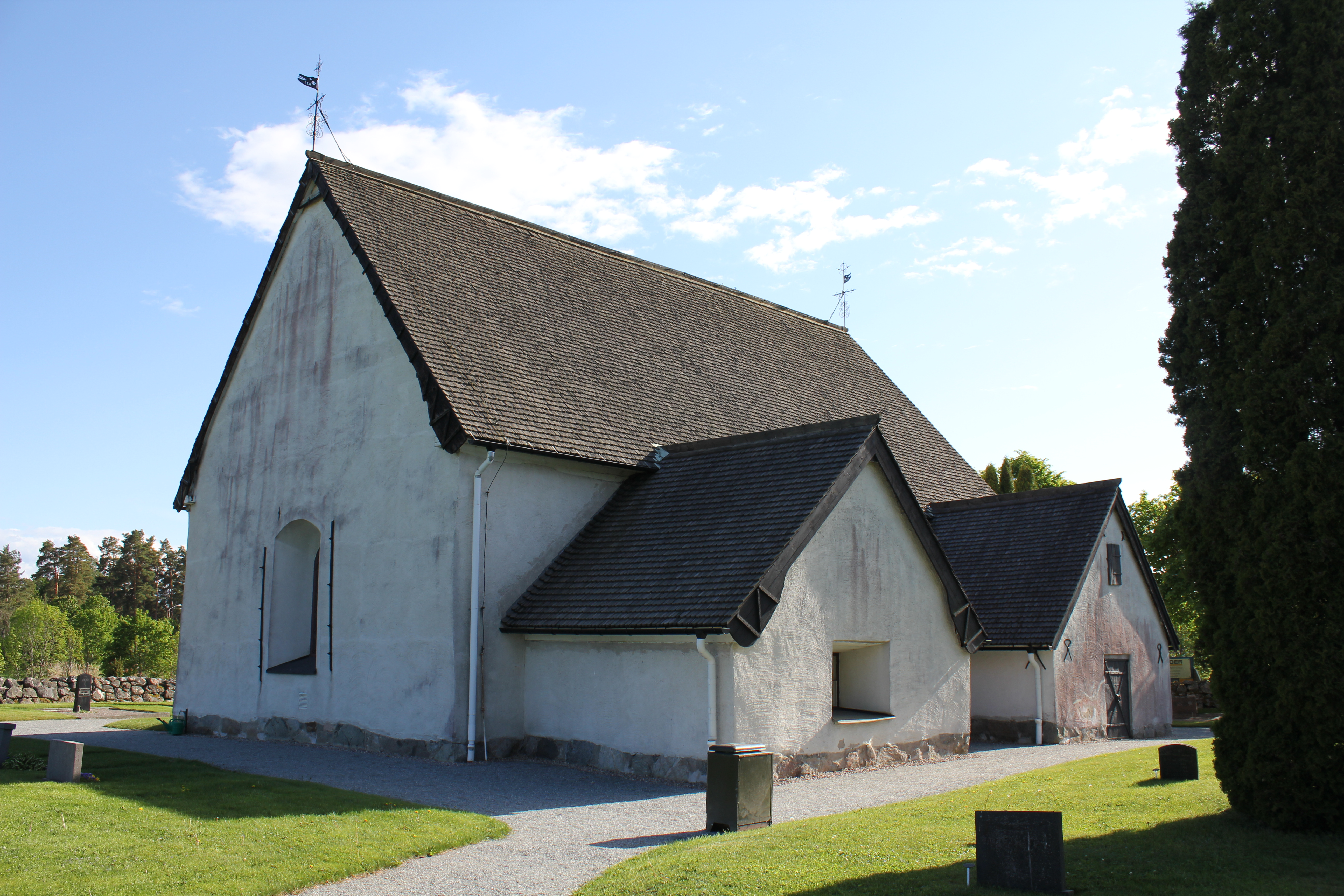 Lillkyrka kyrka, Enköpings kommun.